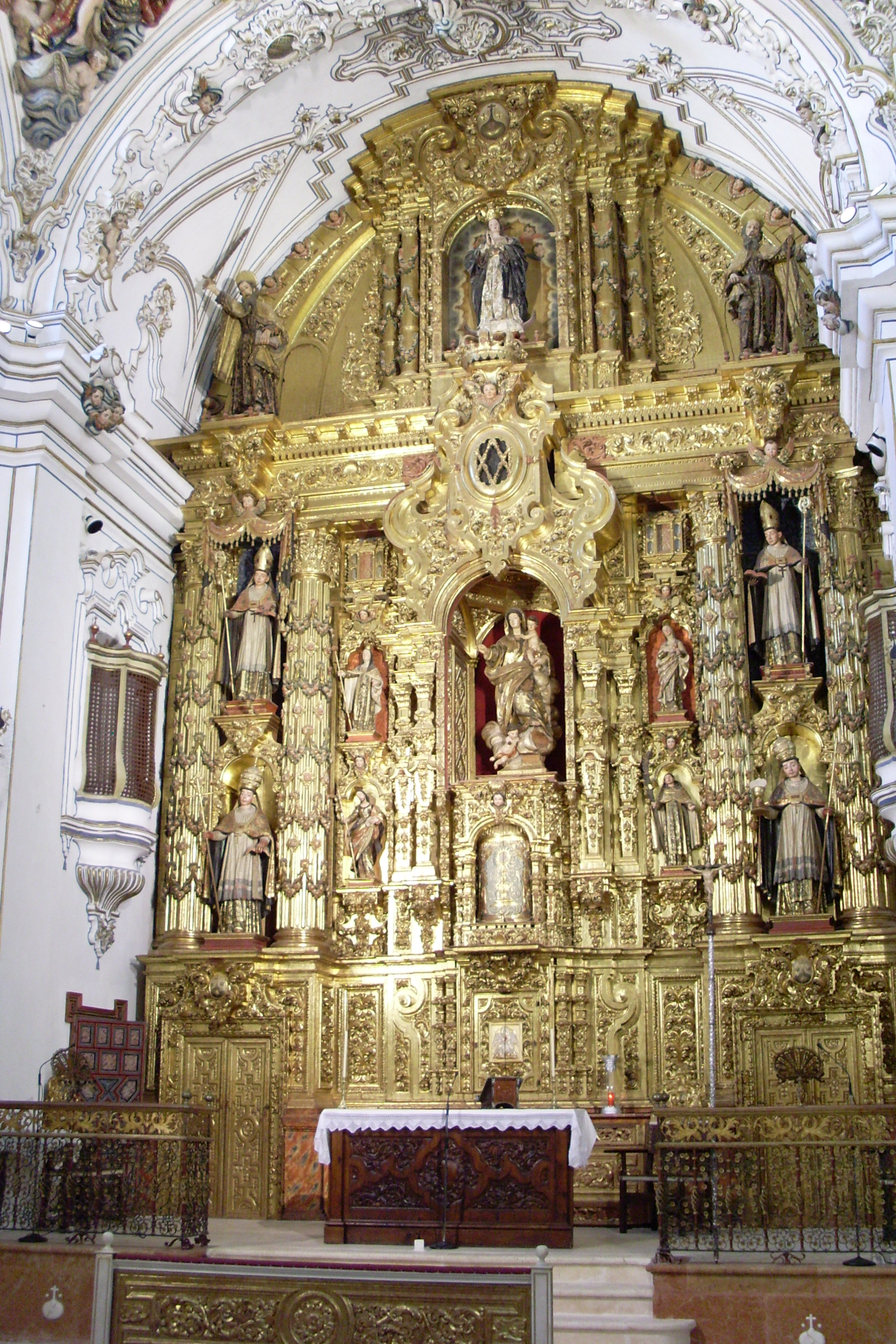 Altar mayor de la Iglesia de los Descalzos de Écija.